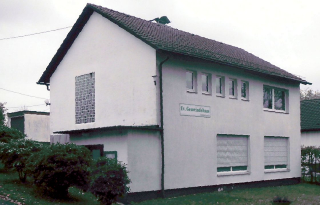 evangelisches Gemeindehaus in Rossenbach, Stadt Waldbröl, Deutschland